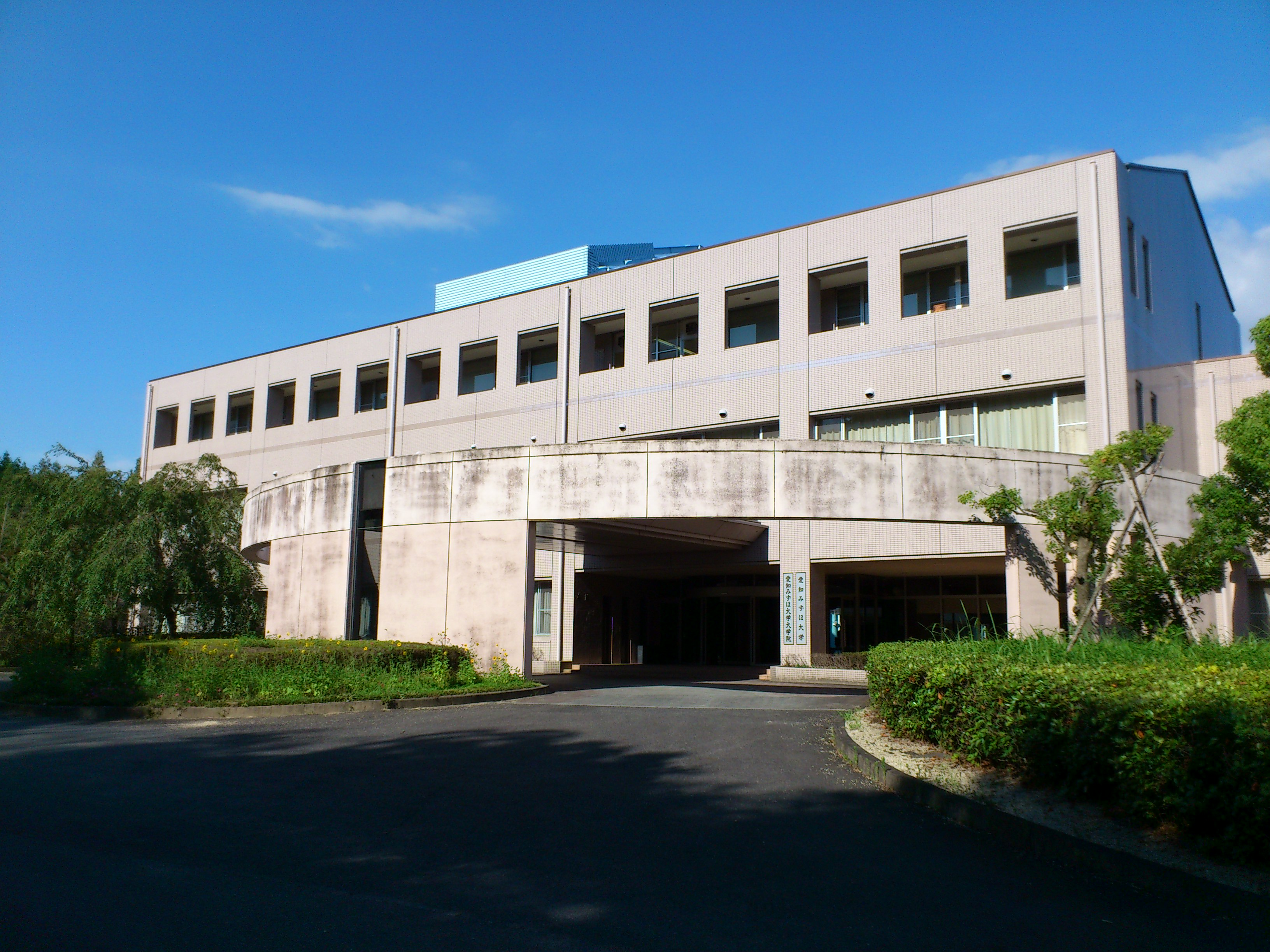 愛知みずほ大学玄関の写真です。